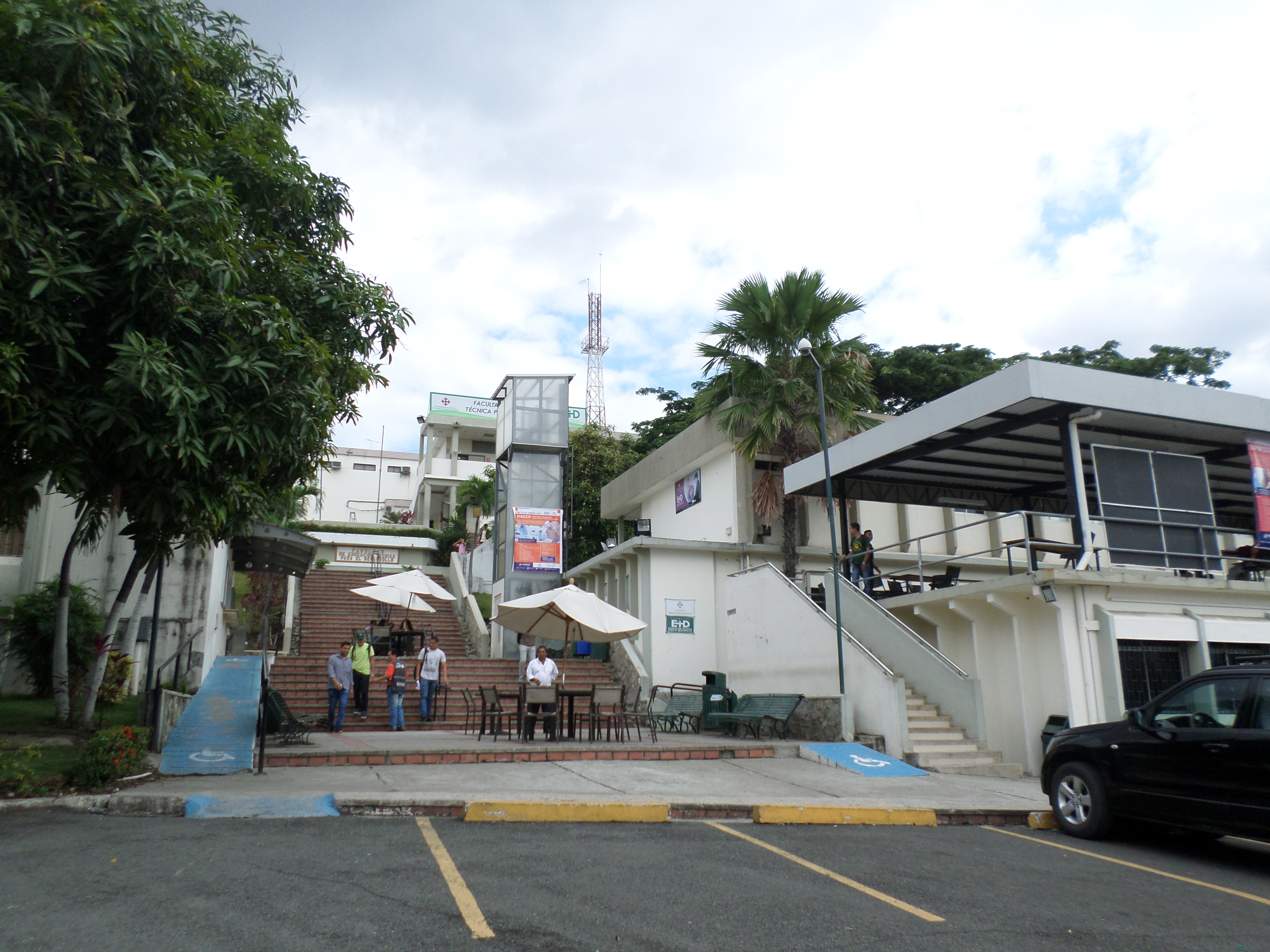 tecnica